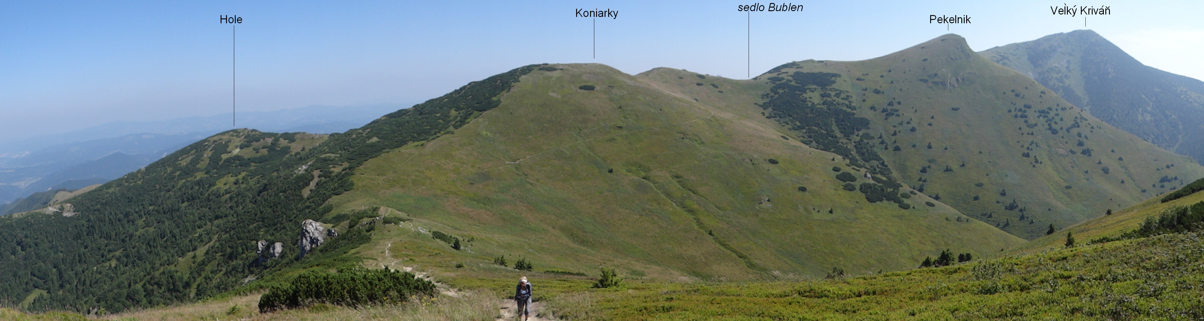 View from Malý Kriváň